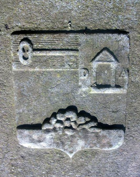 Le blason du baron Guillaume Peyrusse, visible sur sa tombe au cimetière Saint Vincent à Carcassonne: "D'argent à l'île d'Elbe au naturel, baignée par une mer du même, au chef d'azur, à la clef d'or, au franc quartier d'officier de lac maison de l'empereur"